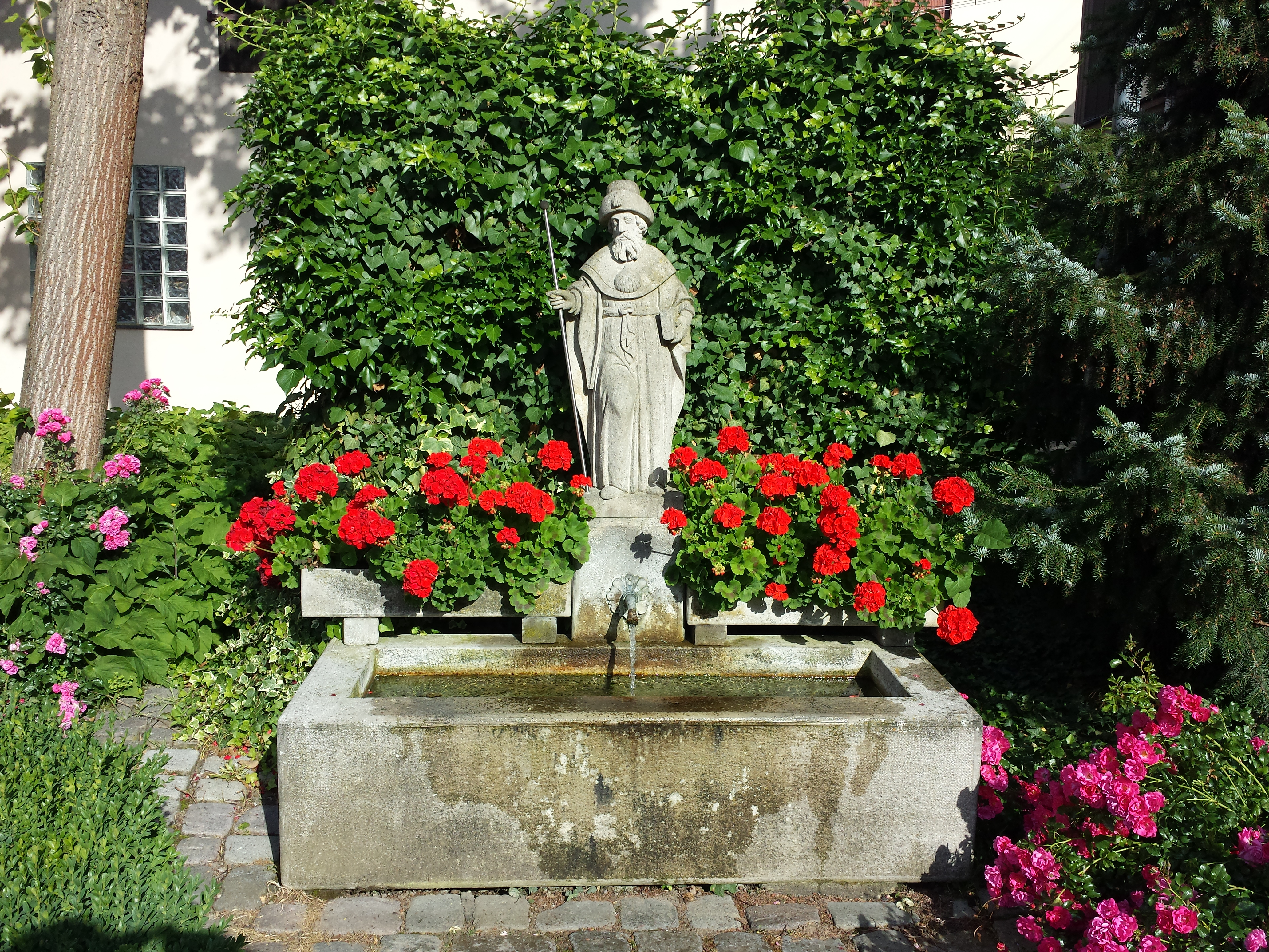 Der Jakobusbrunnen in Dienstadt im Main-Tauber-Kreis in Baden-Württemberg. Der Brunnen steht neben der Jakobuskirche und liegt am Jakobsweg Main-Taubertal.